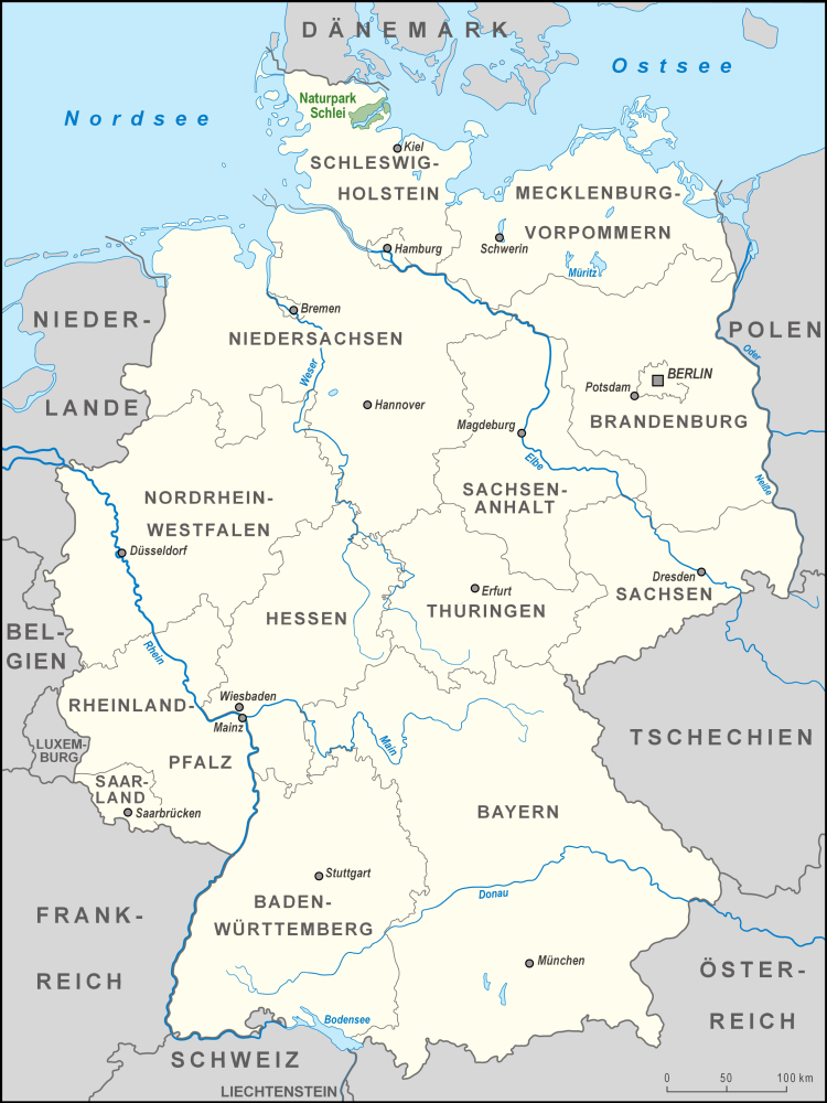 Karte des Naturparks Schlei in Deutschland